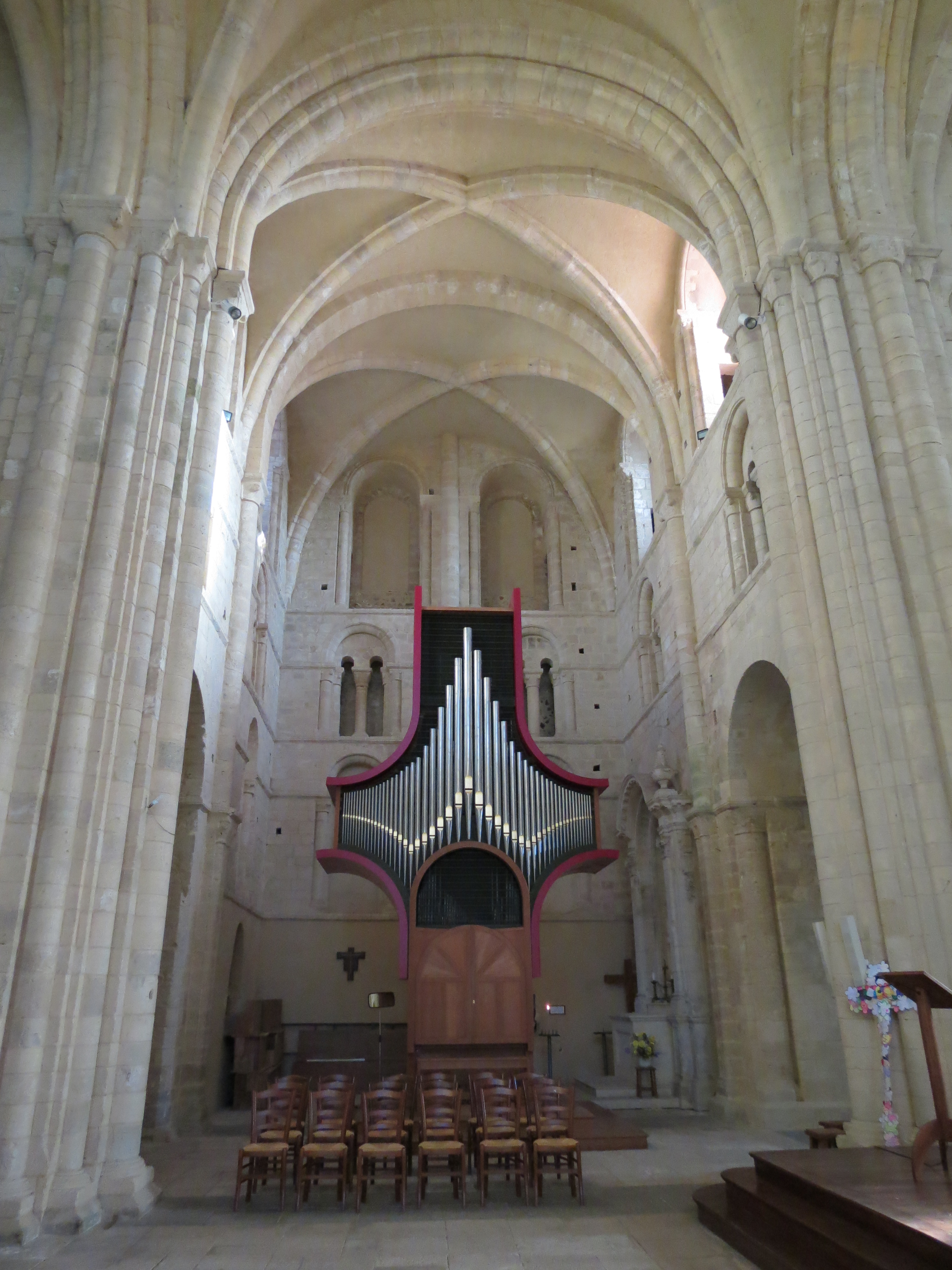 Abbaye de Lessay - transept nord, orgue